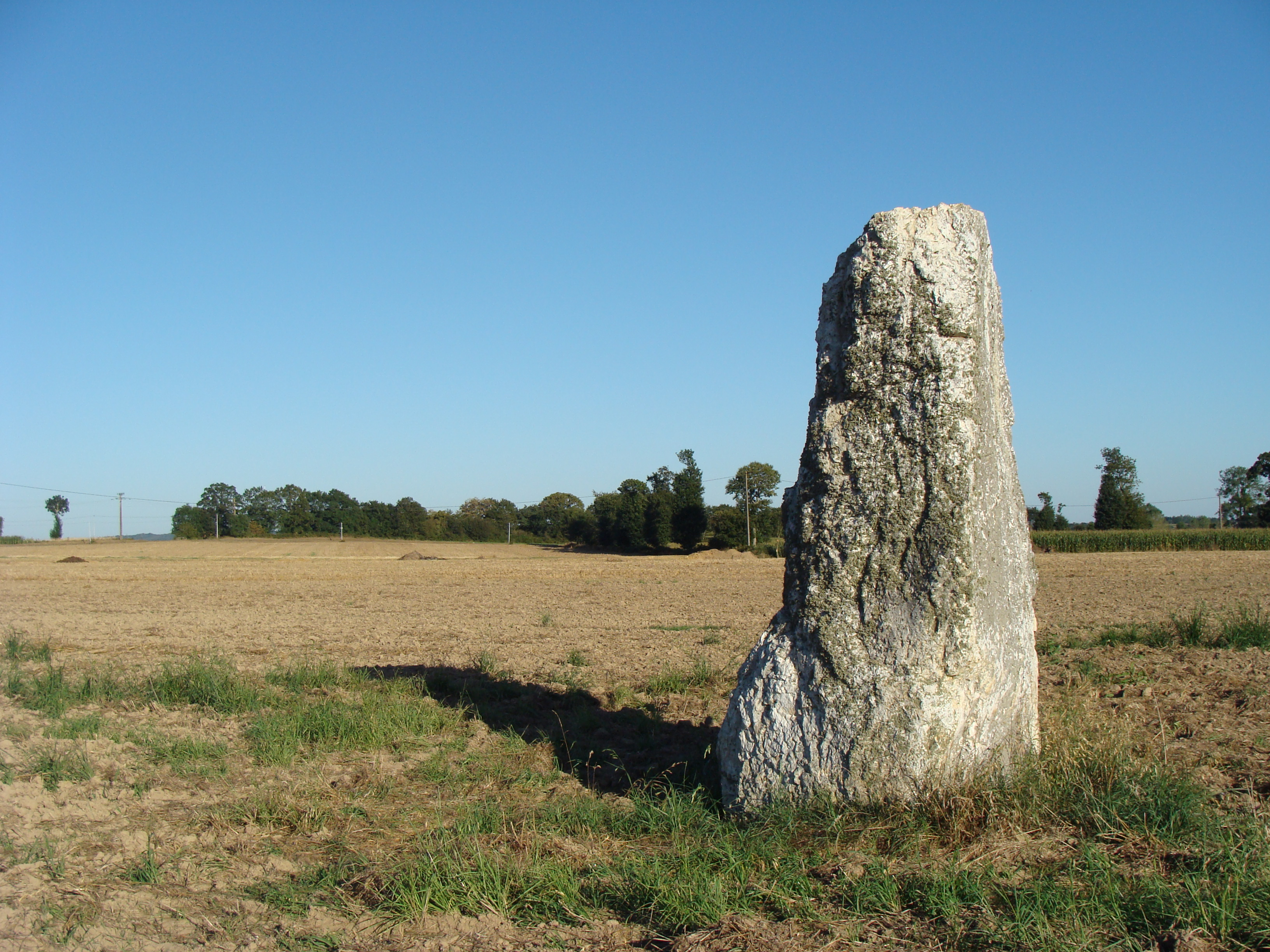 Menhir de La Roche Carrée, à Médréac (Ille-et-Vilaine, France) .